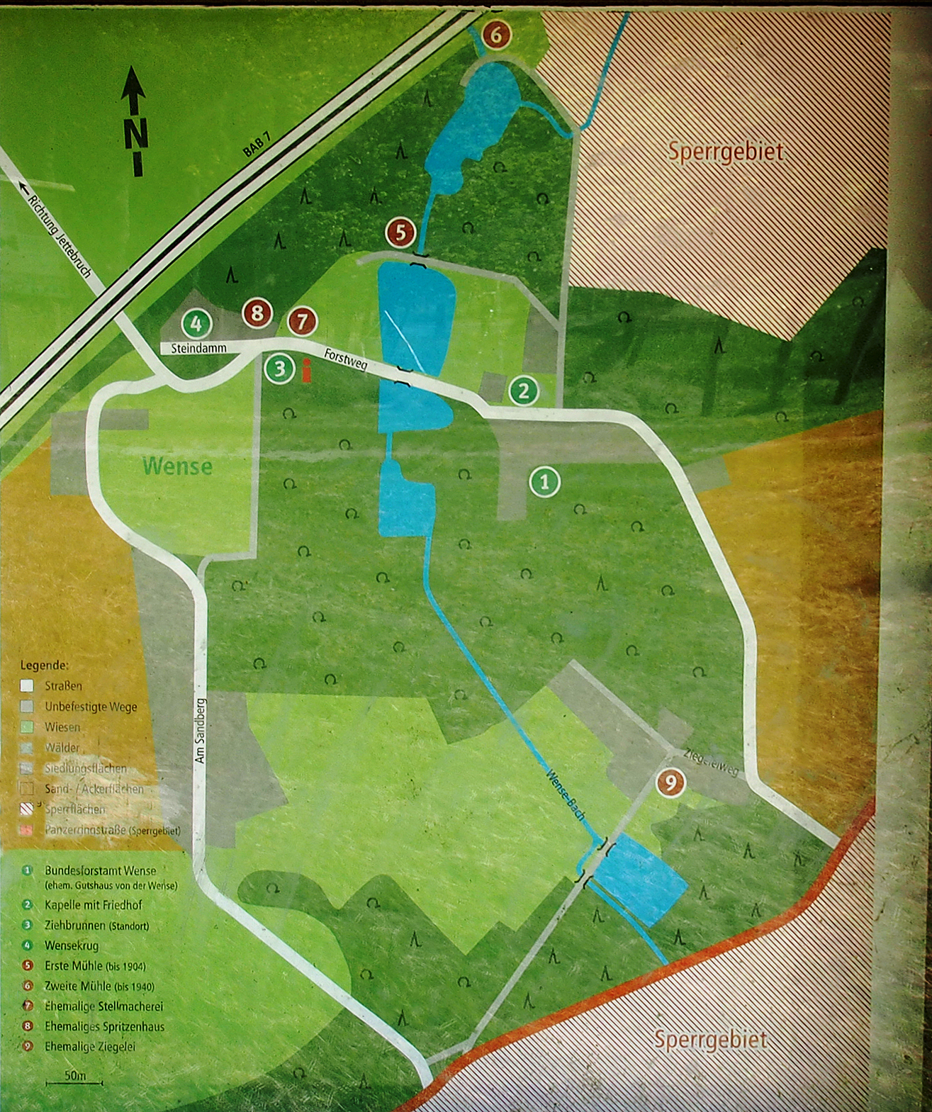 Infotafel mit Übersichtsplan von Wense (Osterheide)